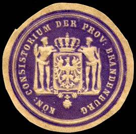 Sealing stamp Title: Königliches Consistorium der Provinz Brandenburg Description: Briefsiegel, violett, weiß, geprägt Place: Potsdam size: 3 cm